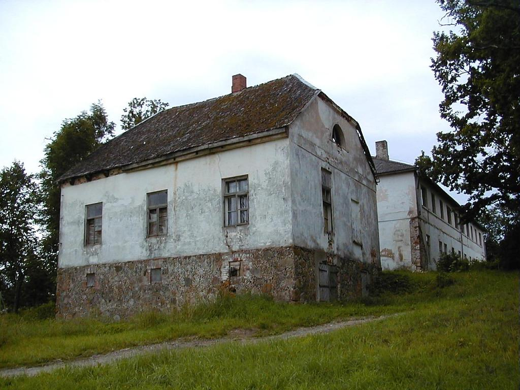 Vecdrustu muiža Drustos 2001-08-04